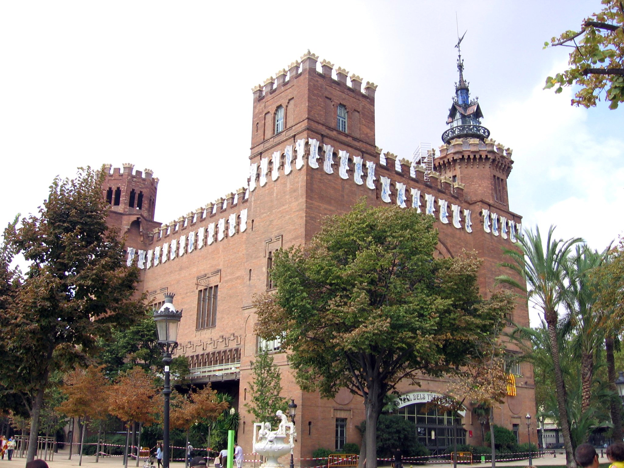 El Castillo de los Tres Dragones, antiguo Museo de Zoología, obra de Lluís Domènech i Montaner, Parque de la Ciudadela, Barcelona.